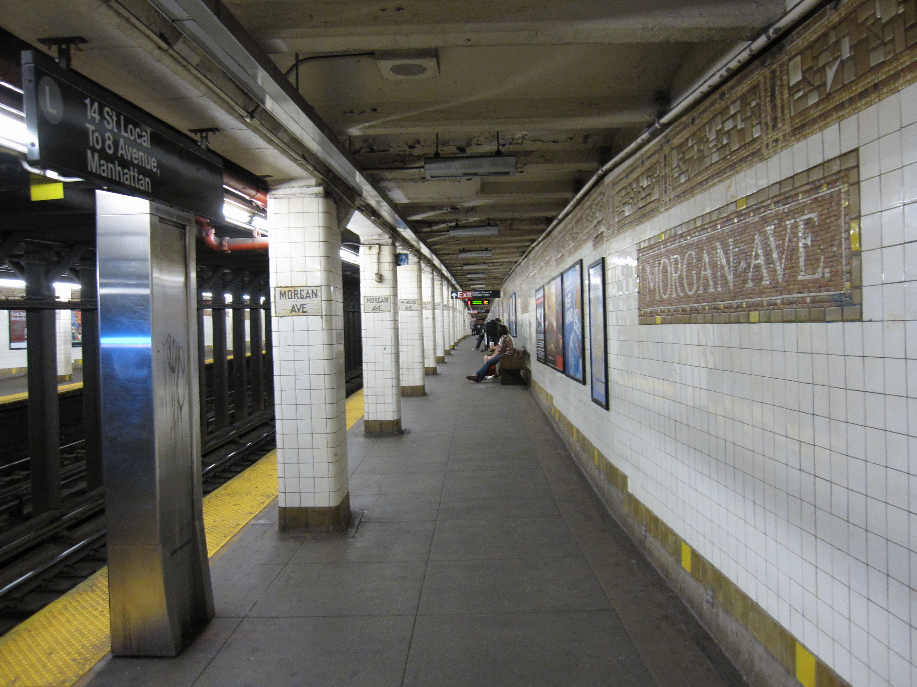 Morgan Avenue (BMT Canarsie Line)